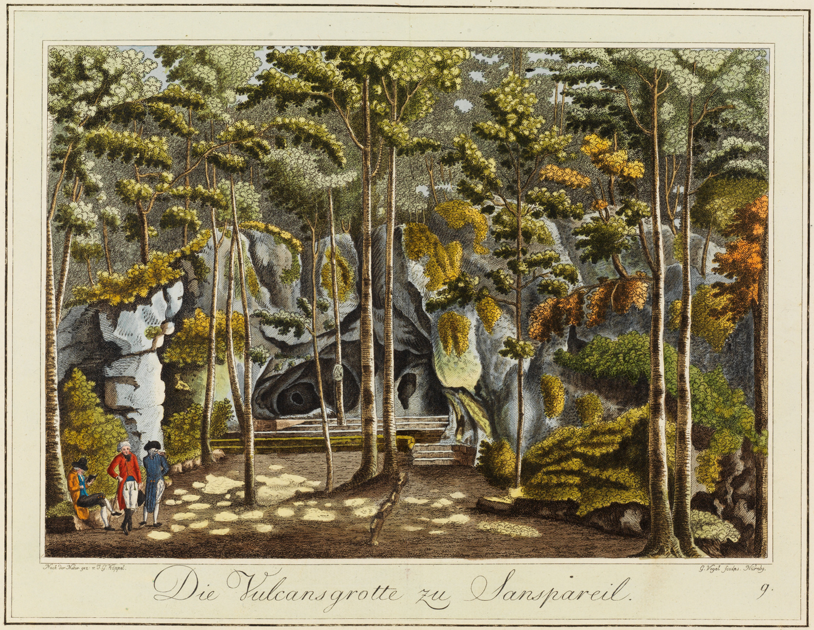 Von G. Vogel gestochene Zeichnung von Johann Gottfried Köppel aus dem Buch Die Eremitage zu Sanspareil. Nach der Natur gezeichnet und beschrieben von Johann Gottfried Köppel. Kais. Landgerichts-Registrator zu Anspach. Erlangen. Verlegt von Wolfgang Walther. 1793.